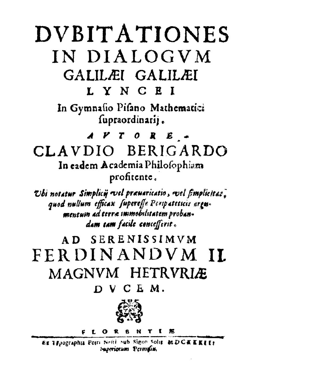 Frontespizio